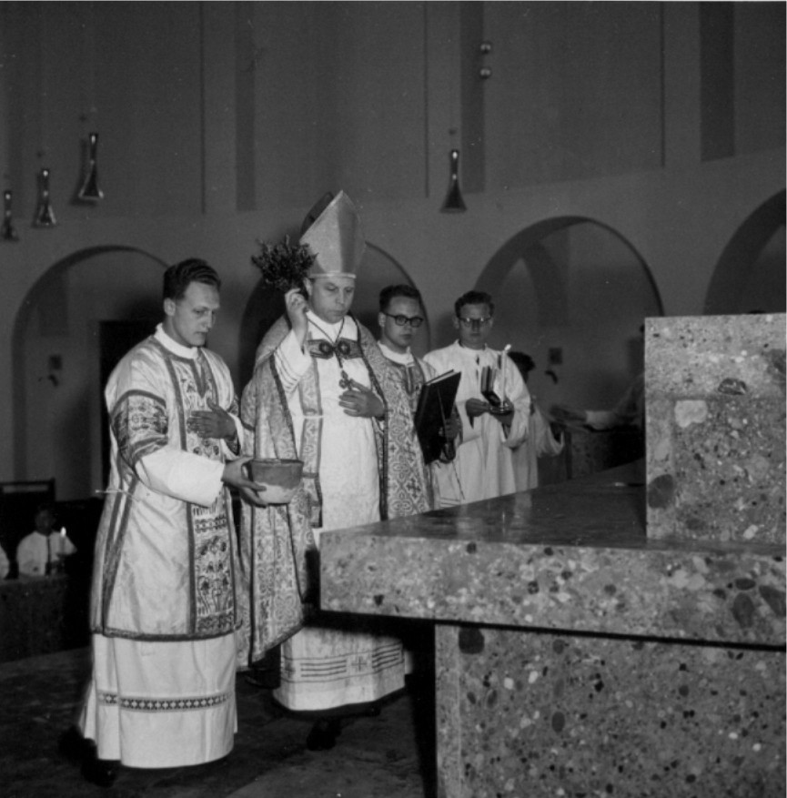 Weihe der Pfarrkirche Liesing (19.,20. Mai 1955)